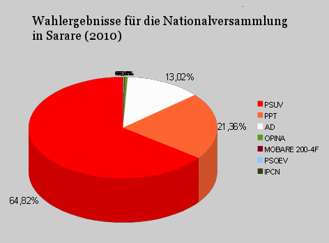 Wahlen in Sarare, Lara, Venezuela (2010), laut CNE